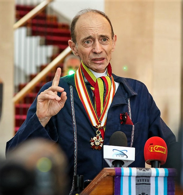 Christopher Wenner erhält den Ordem de Timor-Leste